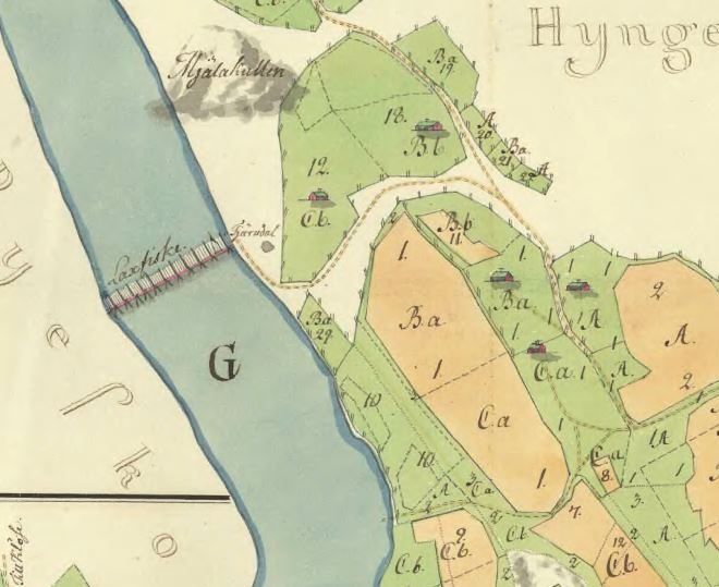 Hyngelsböle by på storskifteskartan från 1784. I Lögdeälven syns den fasta laxfiskeanläggningen.